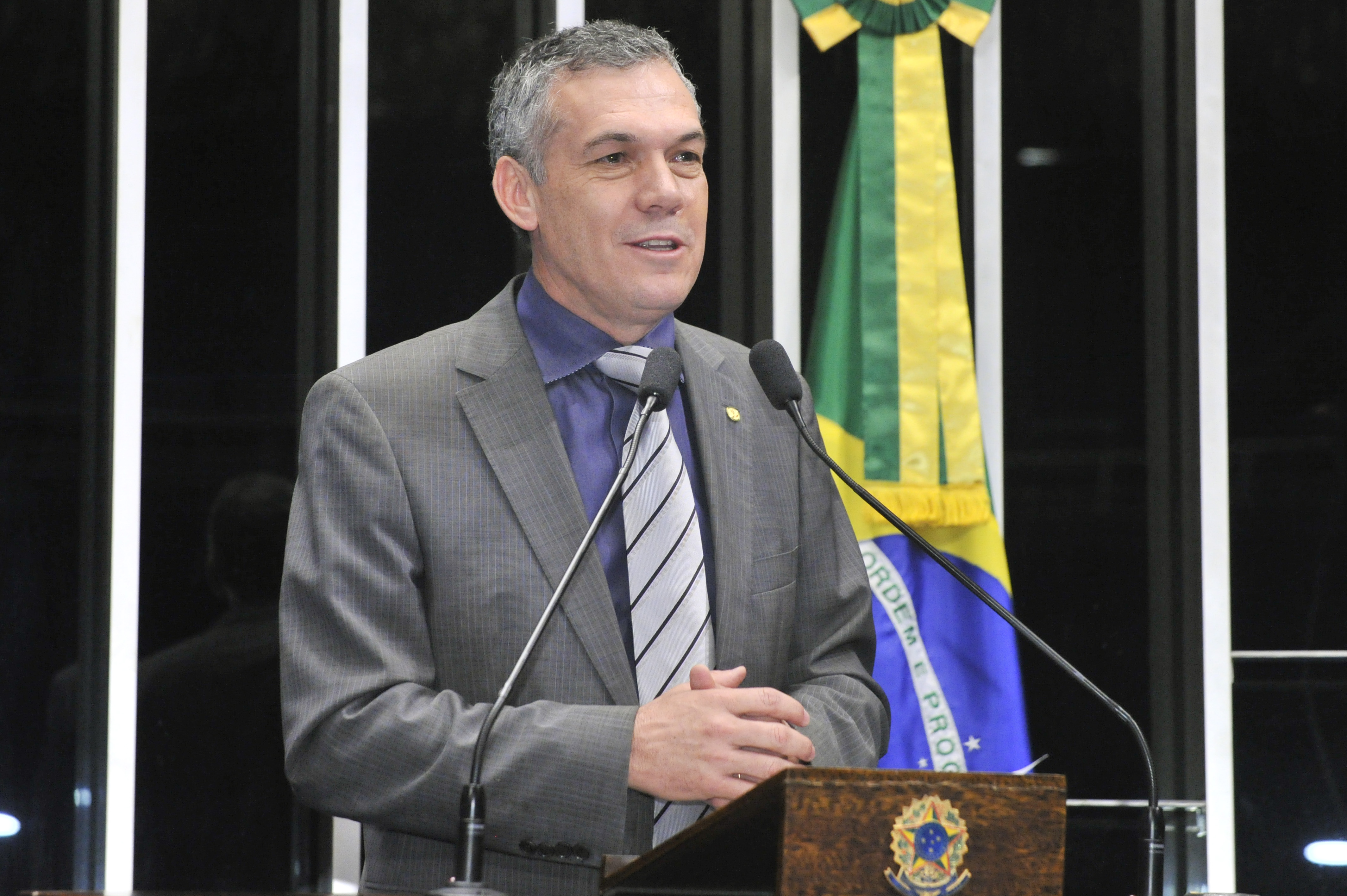 Plenário do Congresso Nacional durante sessão solene para homenagear a 5ª Marcha das Margaridas. A marcha faz parte da agenda do Movimento Sindical de Trabalhadores e Trabalhadoras Rurais, de movimentos feministas e de mulheres, que buscam erradicar todas as formas de discriminação e violência de gênero. O objetivo da sessão é chamar atenção da sociedade para as reivindicações de trabalhadores e trabalhadoras rurais no que se refere principalmente às questões de gênero no campo e na floresta. Em discurso, deputado federal Zé Silva (Solidariedade-MG). Foto: Waldemir Barreto/Agência Senado